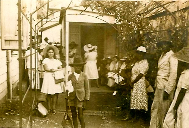 Cabinet du Dr Achille Berg : salle d'attente en plein air. (Source : Famille Berg).